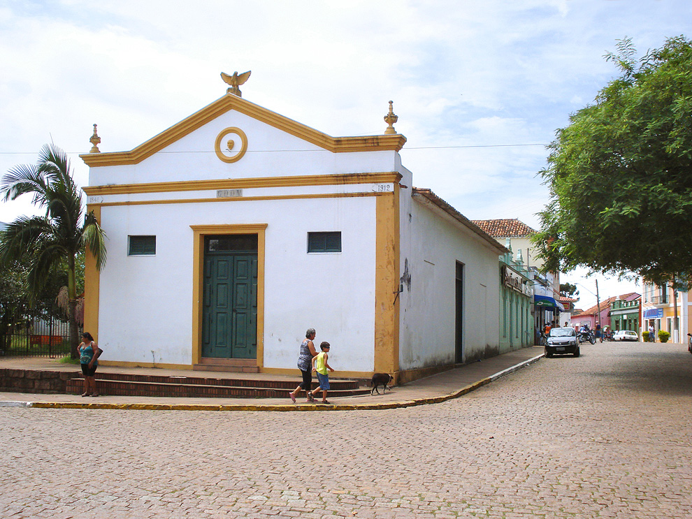 Teatro União (1848), em Triunfo, Rio Grande do Sul, Brasil.